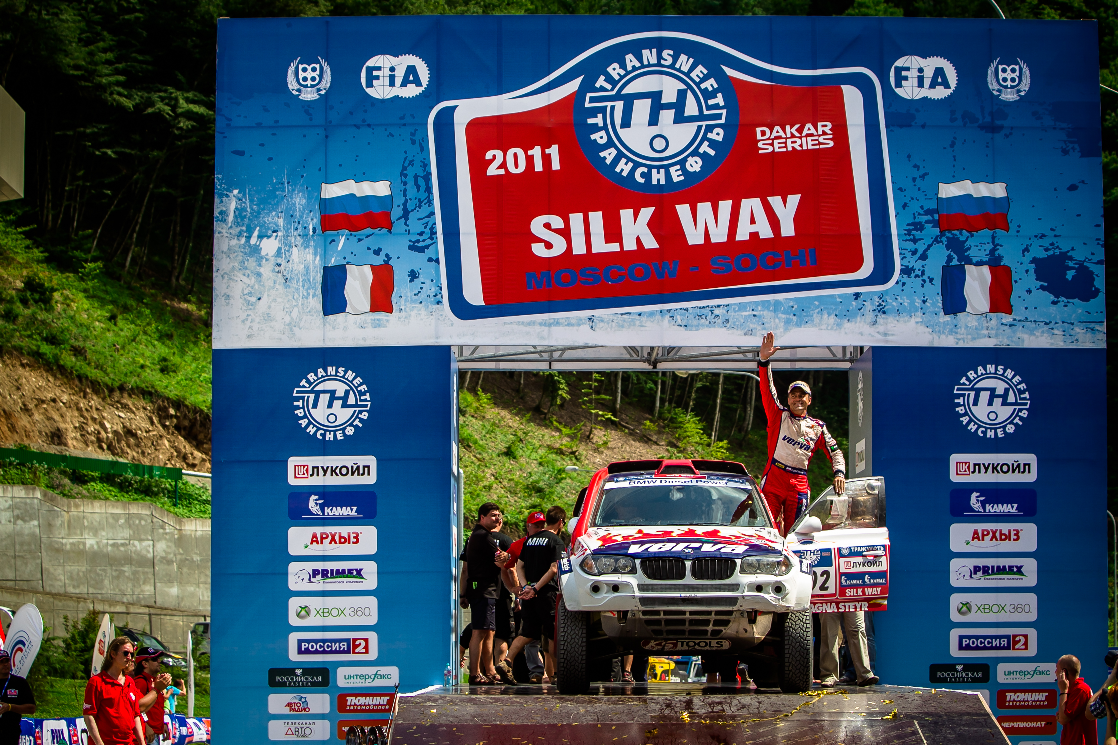 Польский пилот Кшиштов Холовчик на подиуме ралли-марафона "Шелковый путь 2011" в Красной поляне